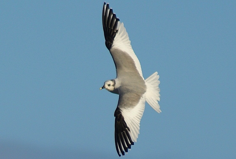 Mewa obrożna (Xema sabini) ptak w upierzeniu spoczynkowym